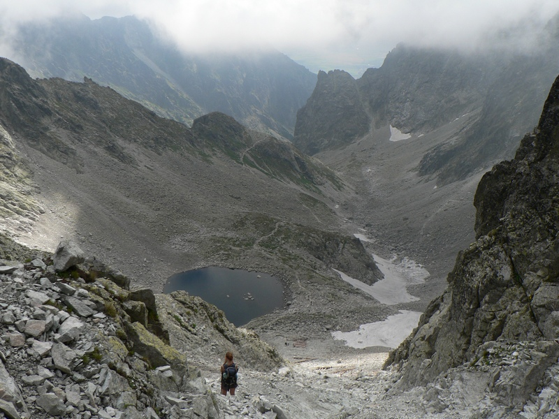 Pohled ze Sedielka k Modrému plesu.